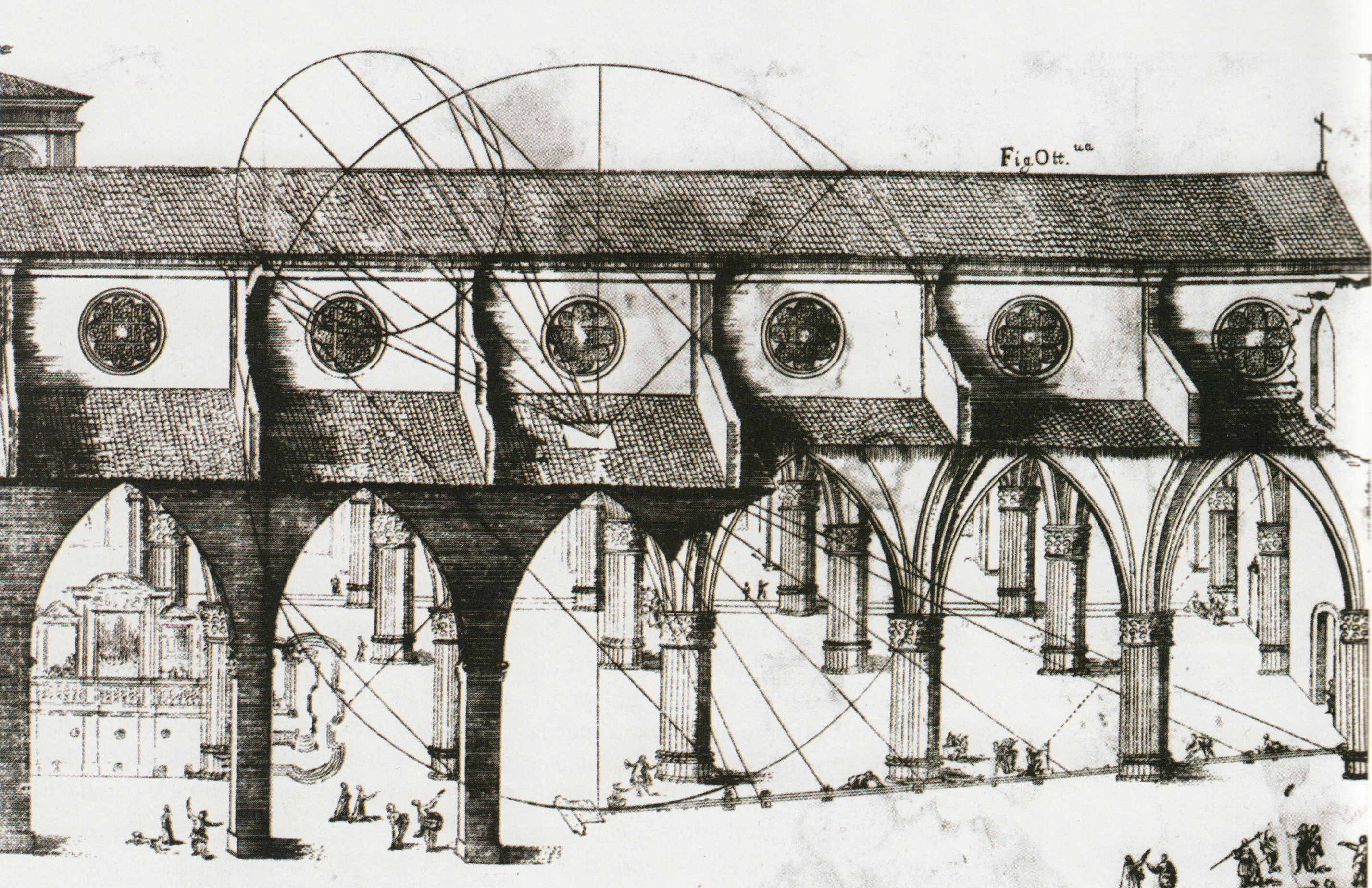 Vue perspective de l'implantation de la méridienne ; détermination de l'emplacement des plaques zodiacales.